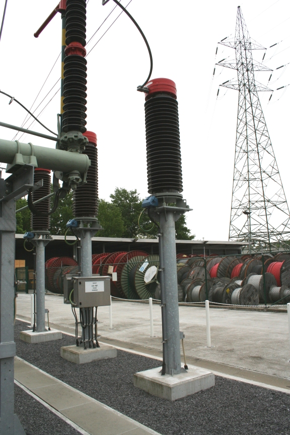 Enkelfasige hoogspannings meettransformator voor het 150 kV ELIA net in de opleidingspost Edison